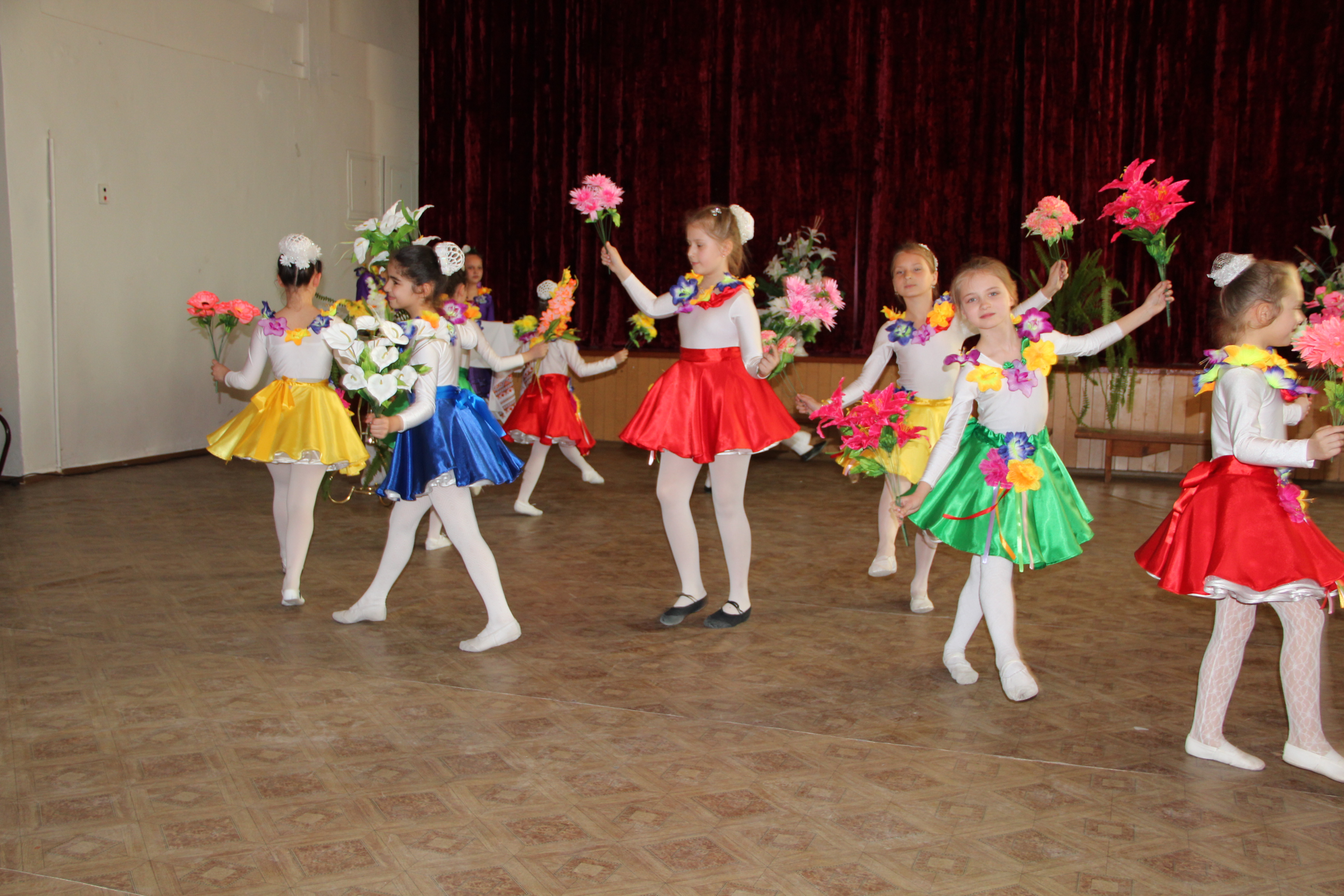 Хореографическое отделение ЛШИ